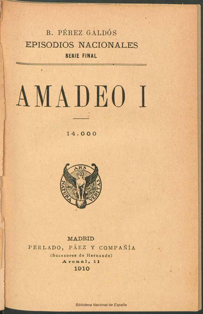 Amadeo I Autor: Pérez Galdós, Benito (1843-1920) Fecha: 1910 Datos de edición: Madrid, Perlado, Páez y Compañía (Sucesores de Hernando)